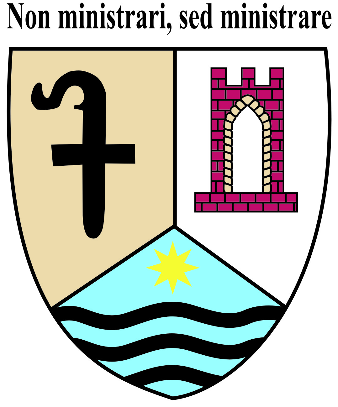 Escudo de Monseñor Puccini, Obispo de Santa Marta